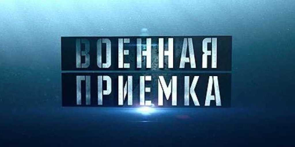 военная приемка передача